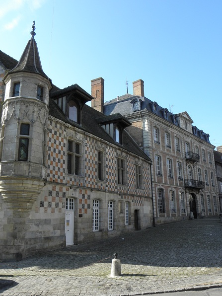 Maison de la renaissance et hôtel classique à Verneuil-sur-AVre (27).